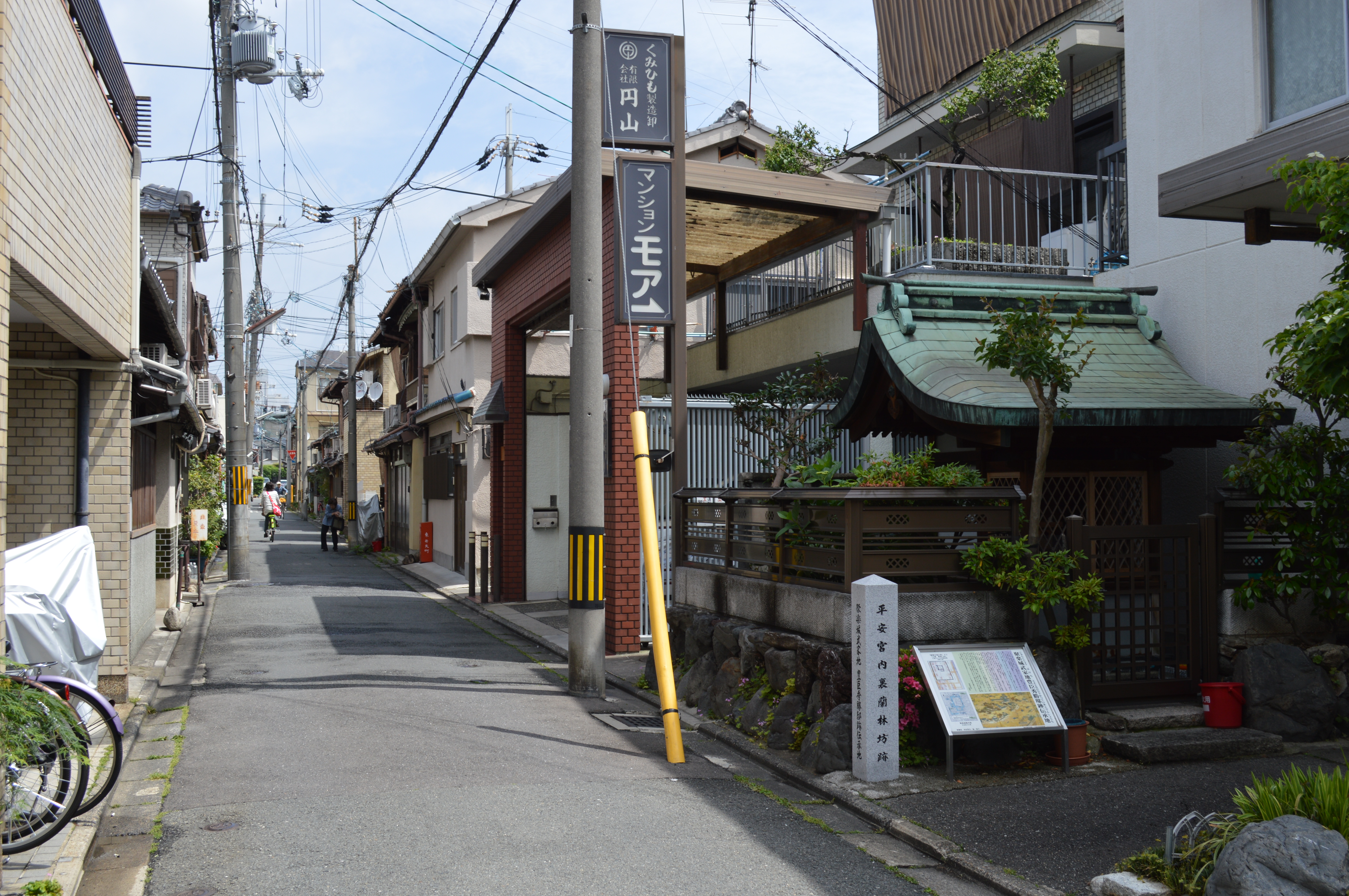 土屋町通と平安宮内裏蘭林坊跡（聚楽城武家地豊臣秀勝邸跡伝承地） 京都市上京区弁天町付近